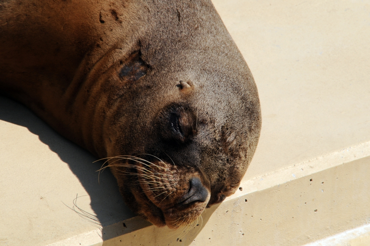 Otaria flavescens, Zoo, Heidelberg, Deutschland